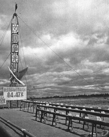 1966-07 1966年大庆长筒岩心